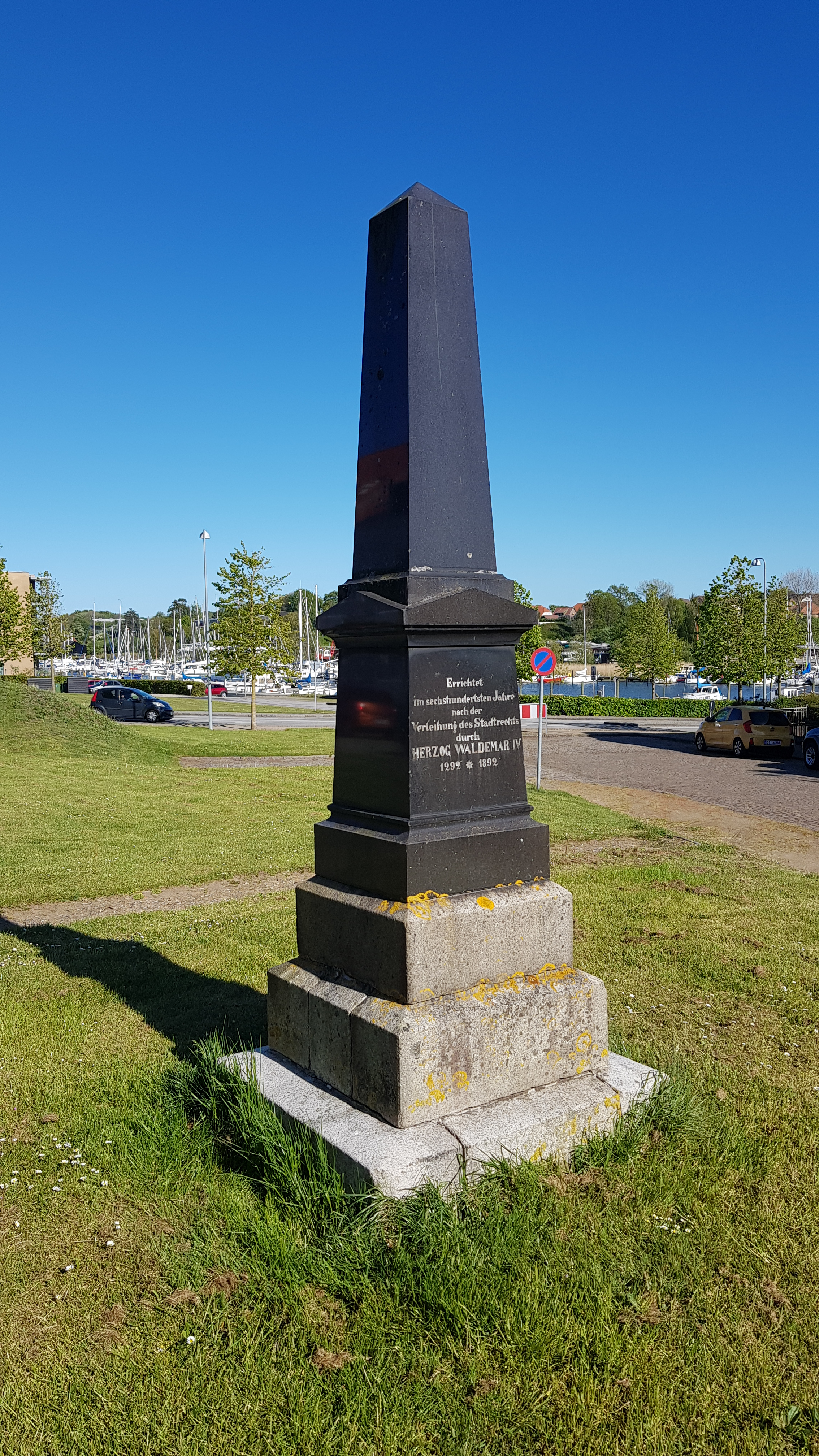 Mindesten i Haderslev med inskriptionen "Zur erinnerung an Herzog Hans den Aelteren" (på modsatte side), på dansk "Til erindring om Hertug Hans den Ældre"